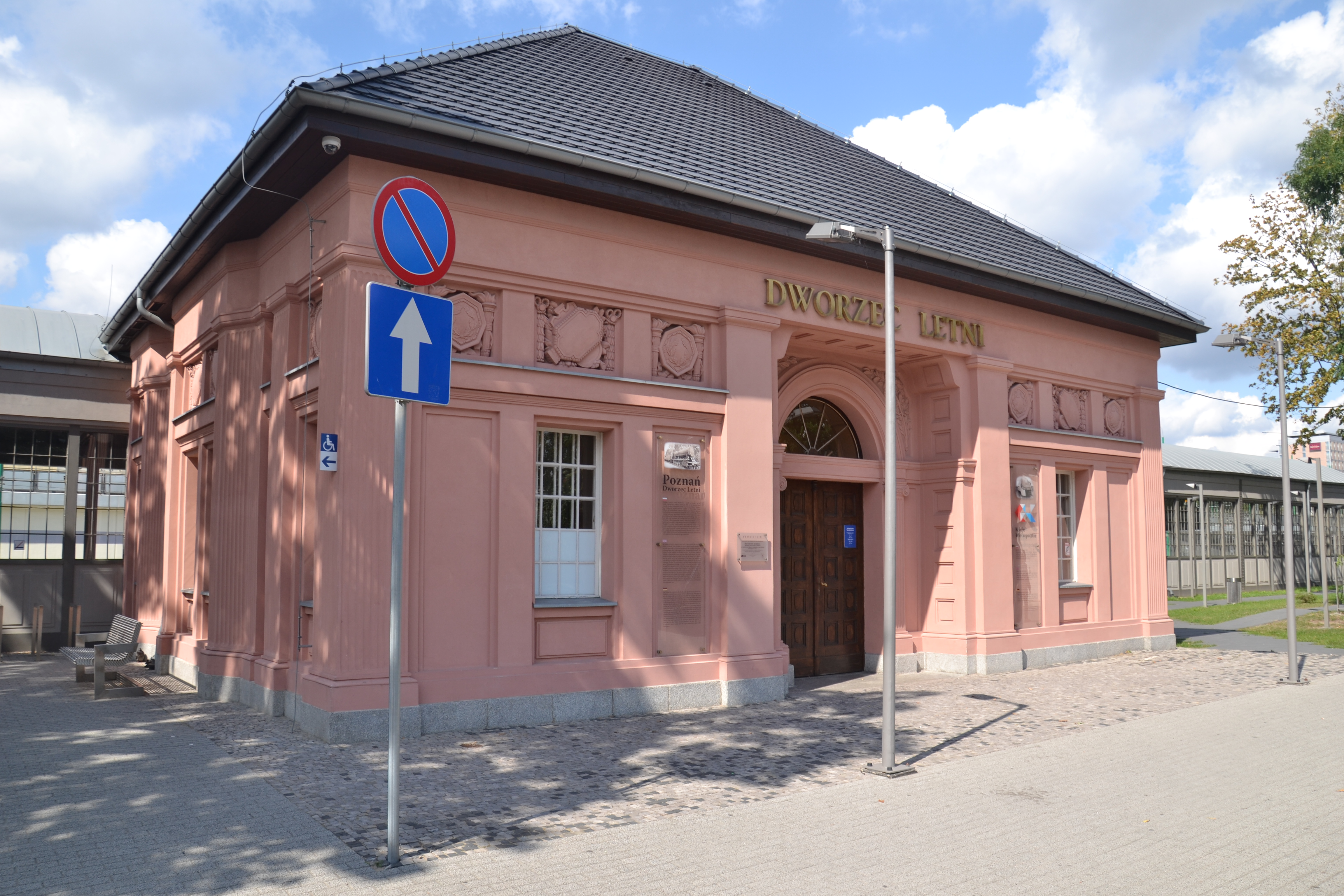 Front Dworca Letniego w Poznaniu, peron 4b